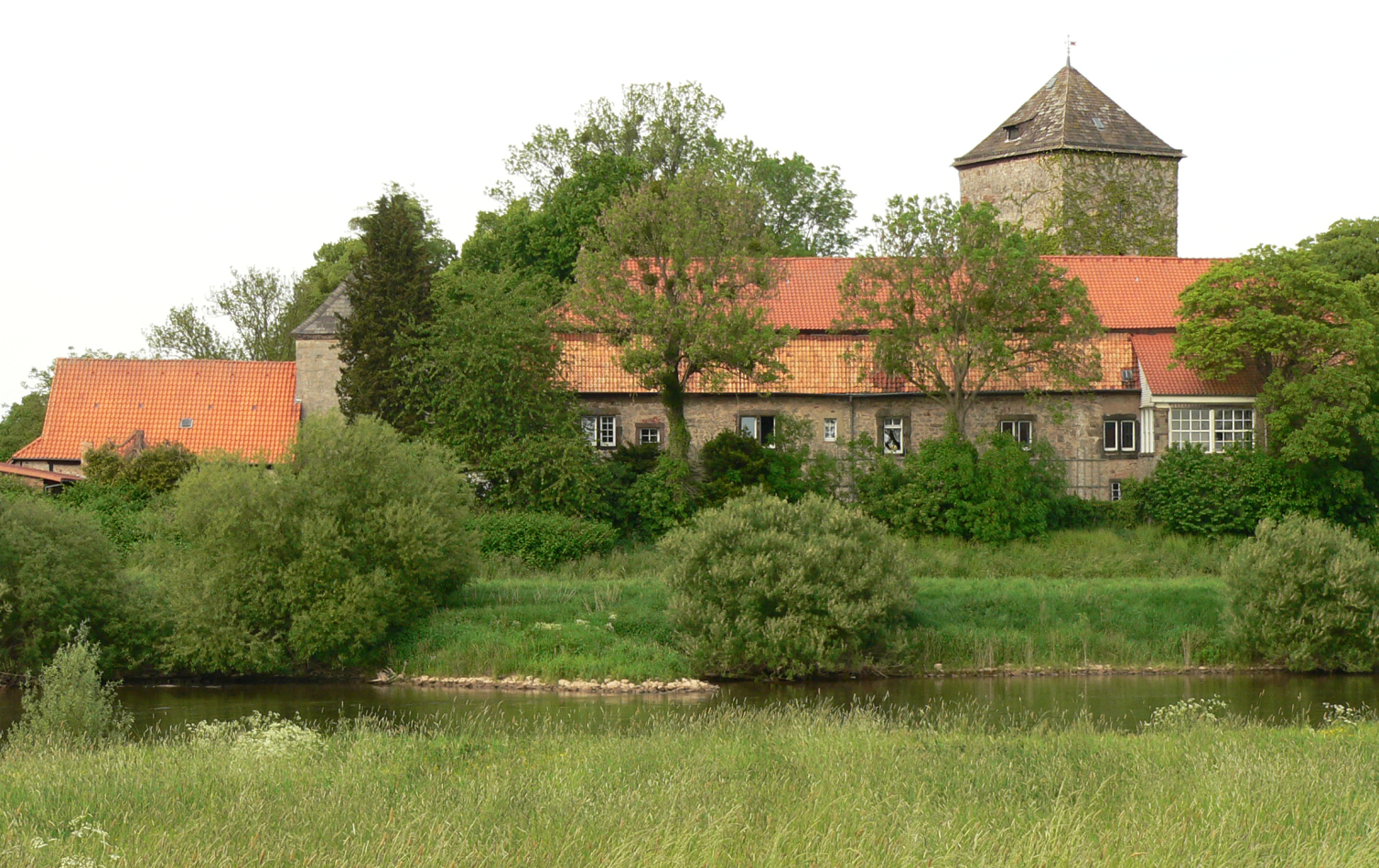 Burg Ohsen